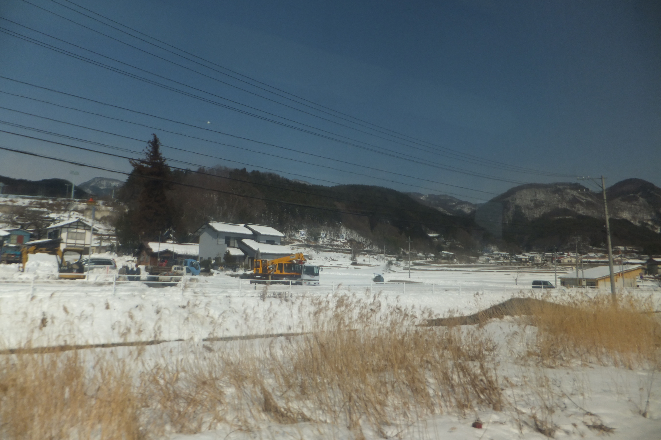 長野県東筑摩郡麻績村の平成26年豪雪時の様子